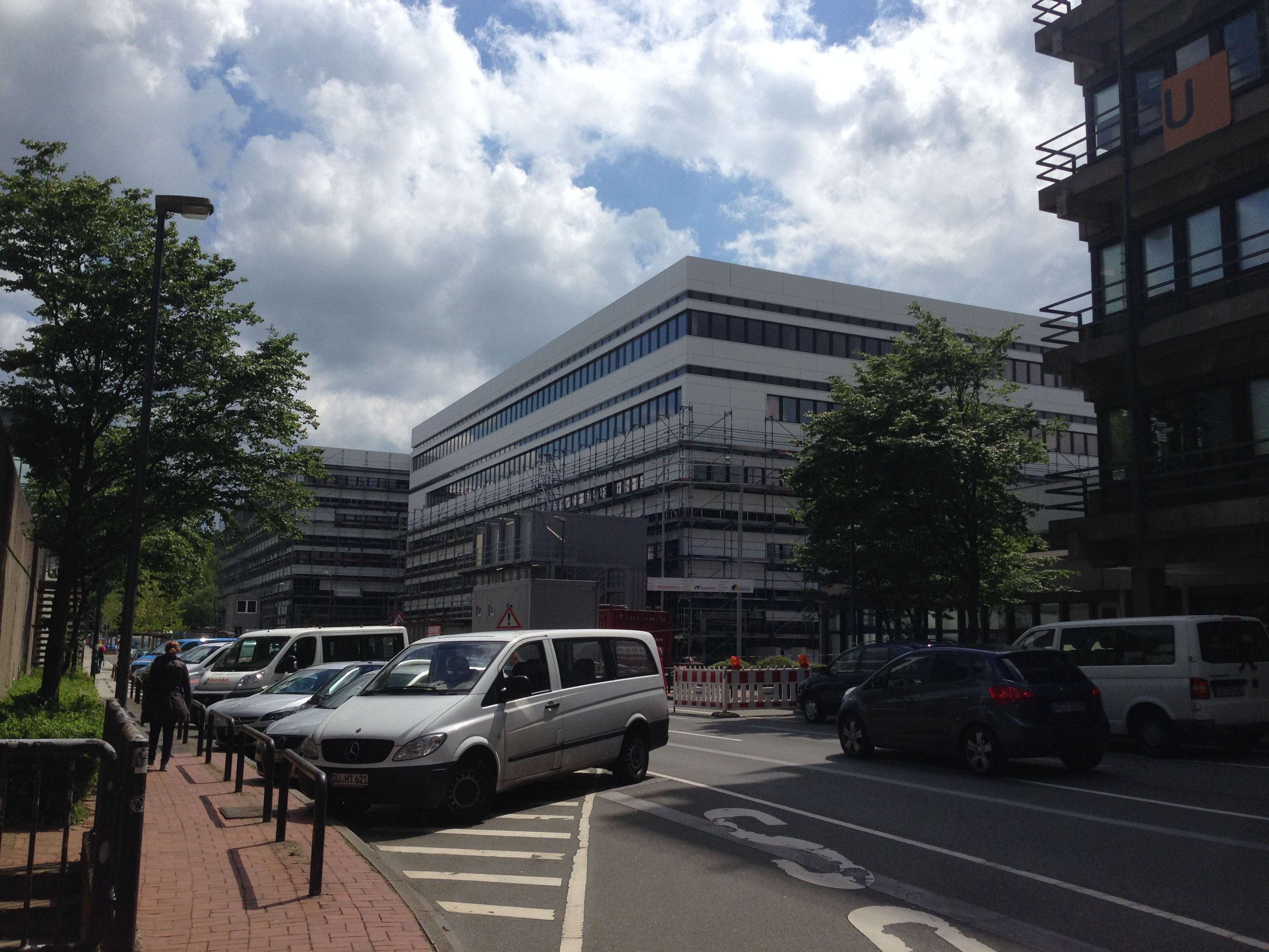 Fortgeschrittener Neubau an der Bergischen Universität zwischen Gaußstraße und Max-Horkheimer-Straße.